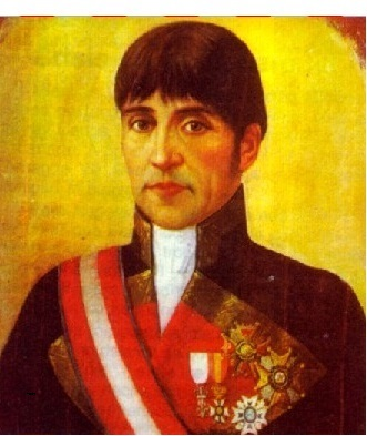 Retrato del virrey Baltasar Hidalgo de Cisneros (1756-1829)